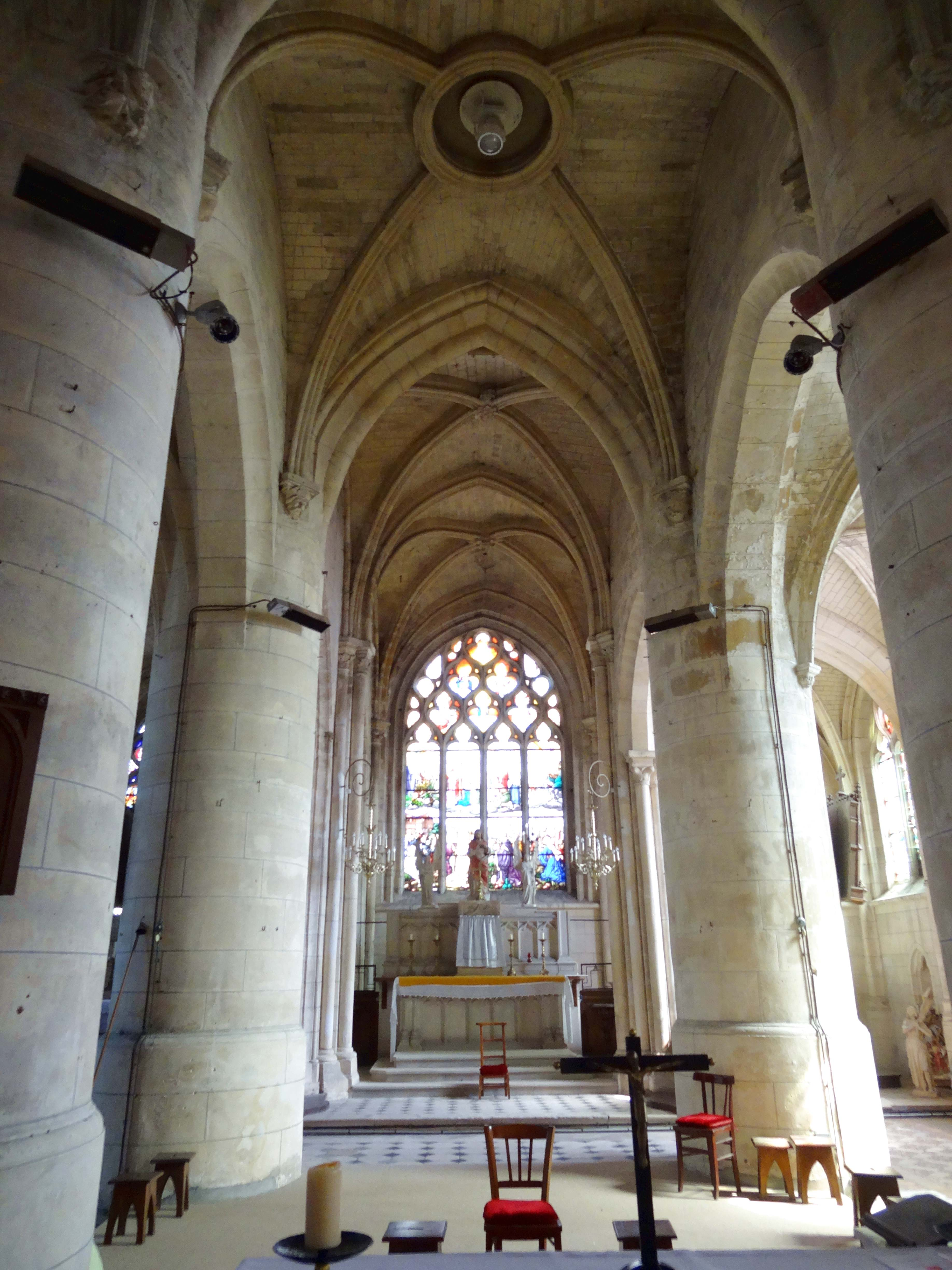 Intérieur de l'église - voir titre.